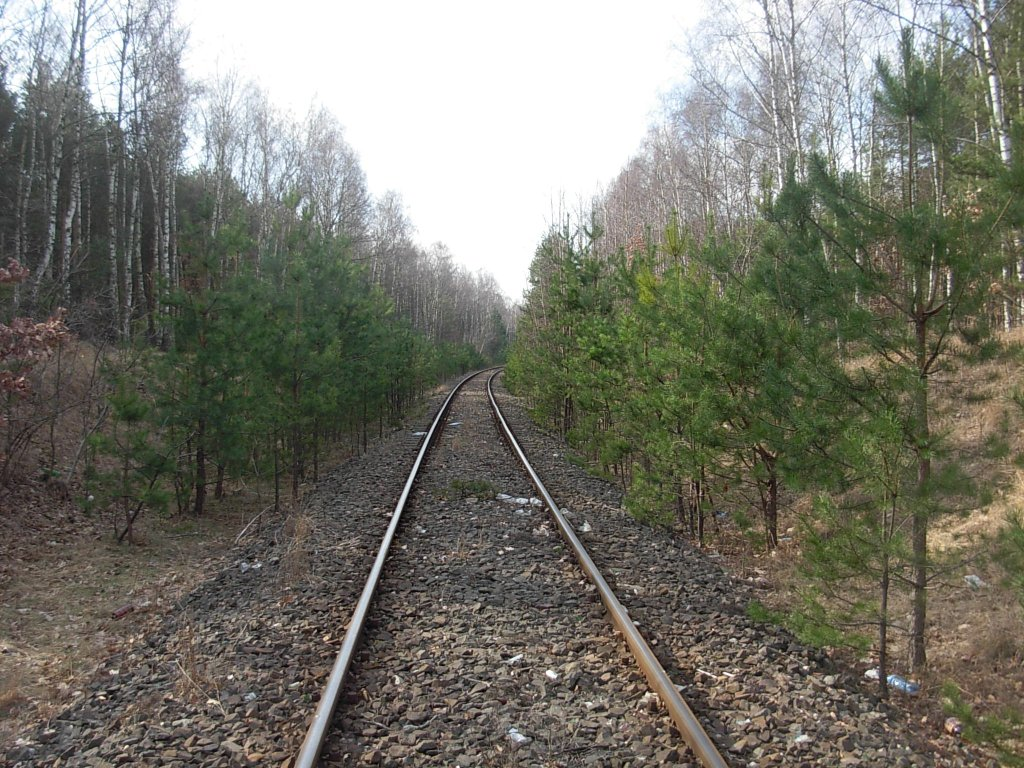 Linia kolejowa nr 356 Bydgoszcz-Kcynia-Poznań na os. Błonie w Bydgoszczy